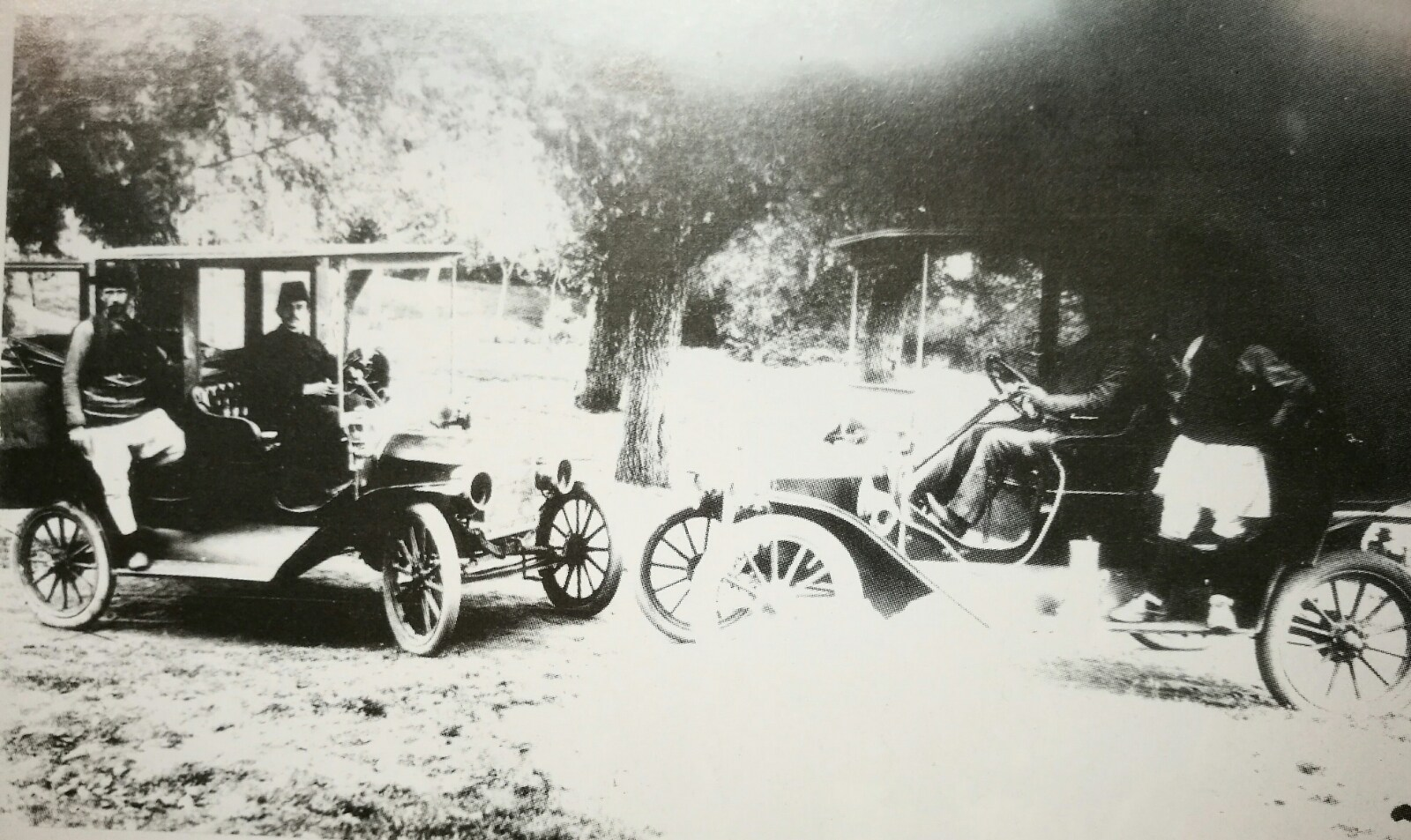 Фотографија на Милтон Манаки од Ford Model T модел од 1908 година, фотографирано во Битола.